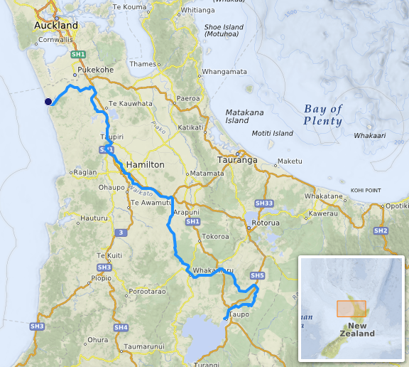 carte réalisée sur umap [1] This map may be incomplete, and may contain errors. Don't rely solely on it for navigation.